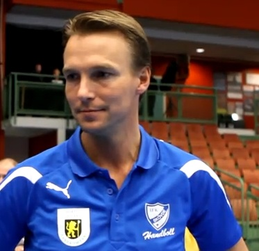 Henrik Schneider, tränare i IFK Skövde